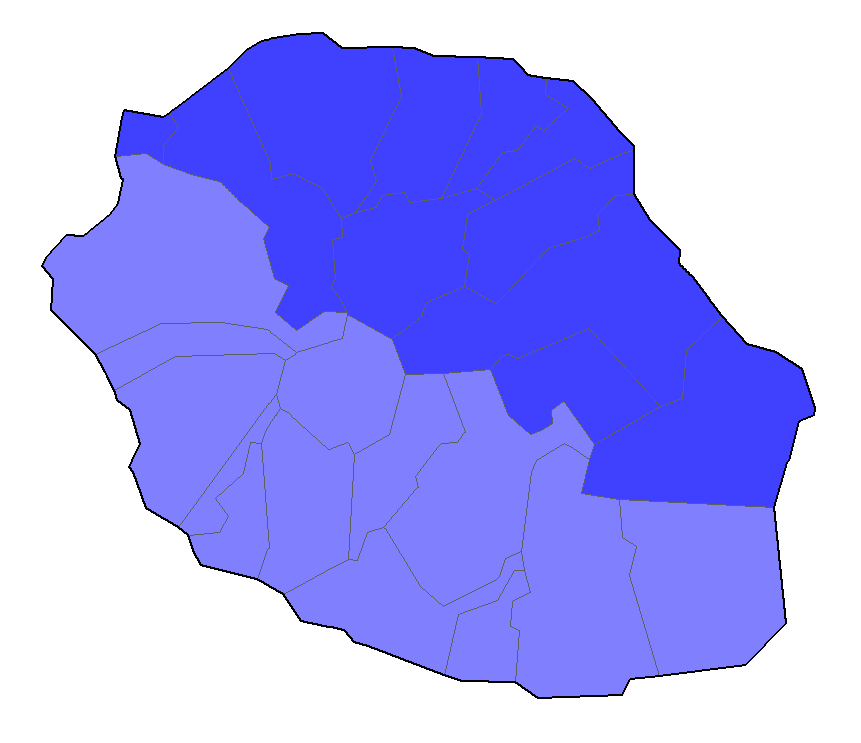 Carte des deux départements de la Réunion prévus par le projet de loi d'orientation pour l'outre-mer abandonné en 2000.